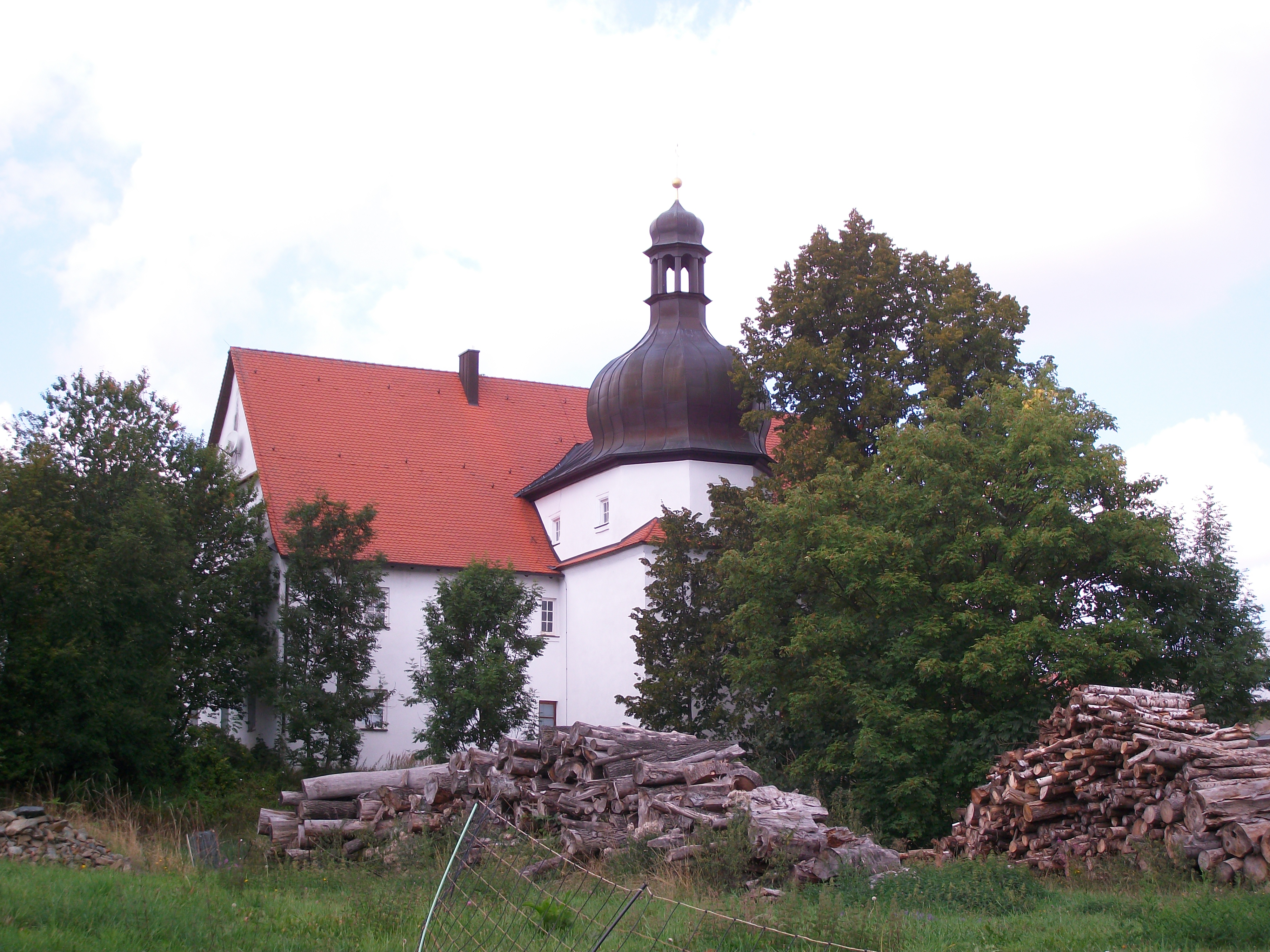 Herrenhaus des Ritterguts Gutenfürst